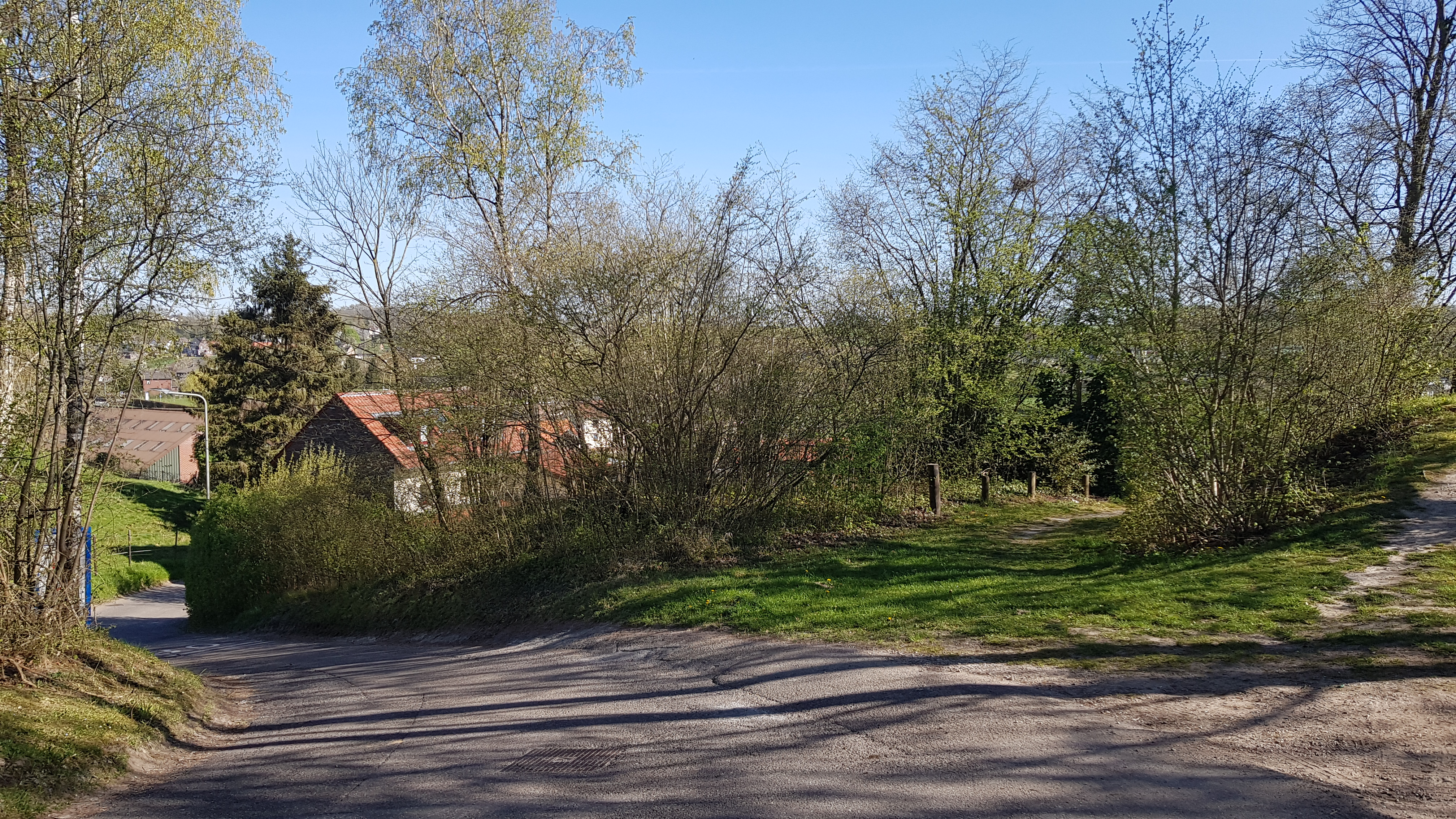 Kalkoven Engwegen, Schin op Geul, Nederland